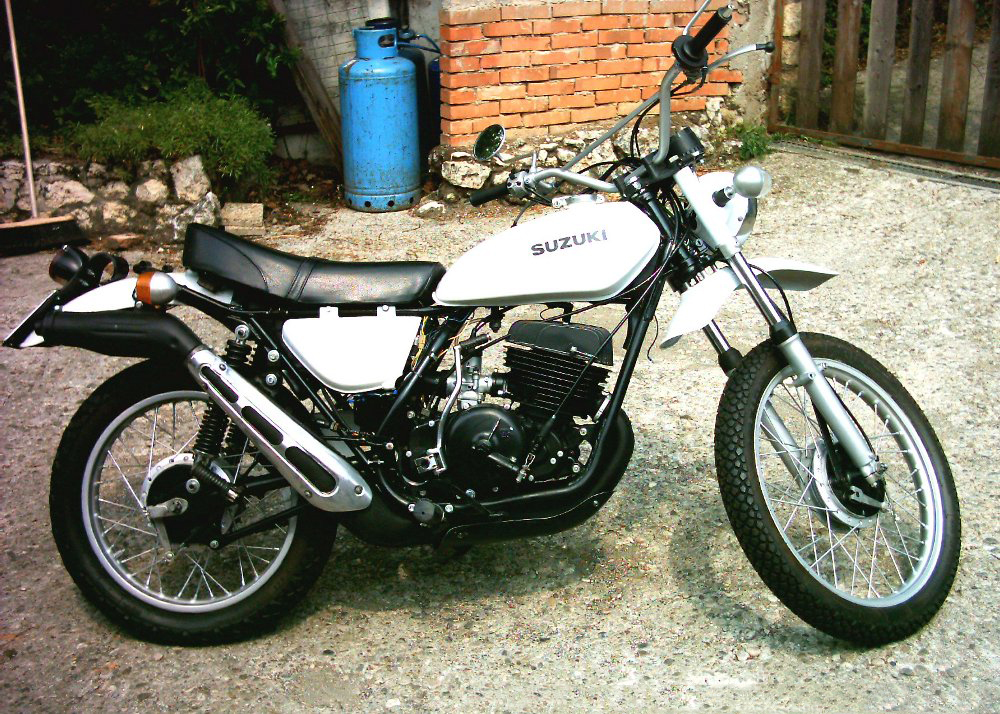 Suzuki 400 TS del 1977